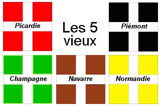 Assemblage des drapeaux des 5 vieux